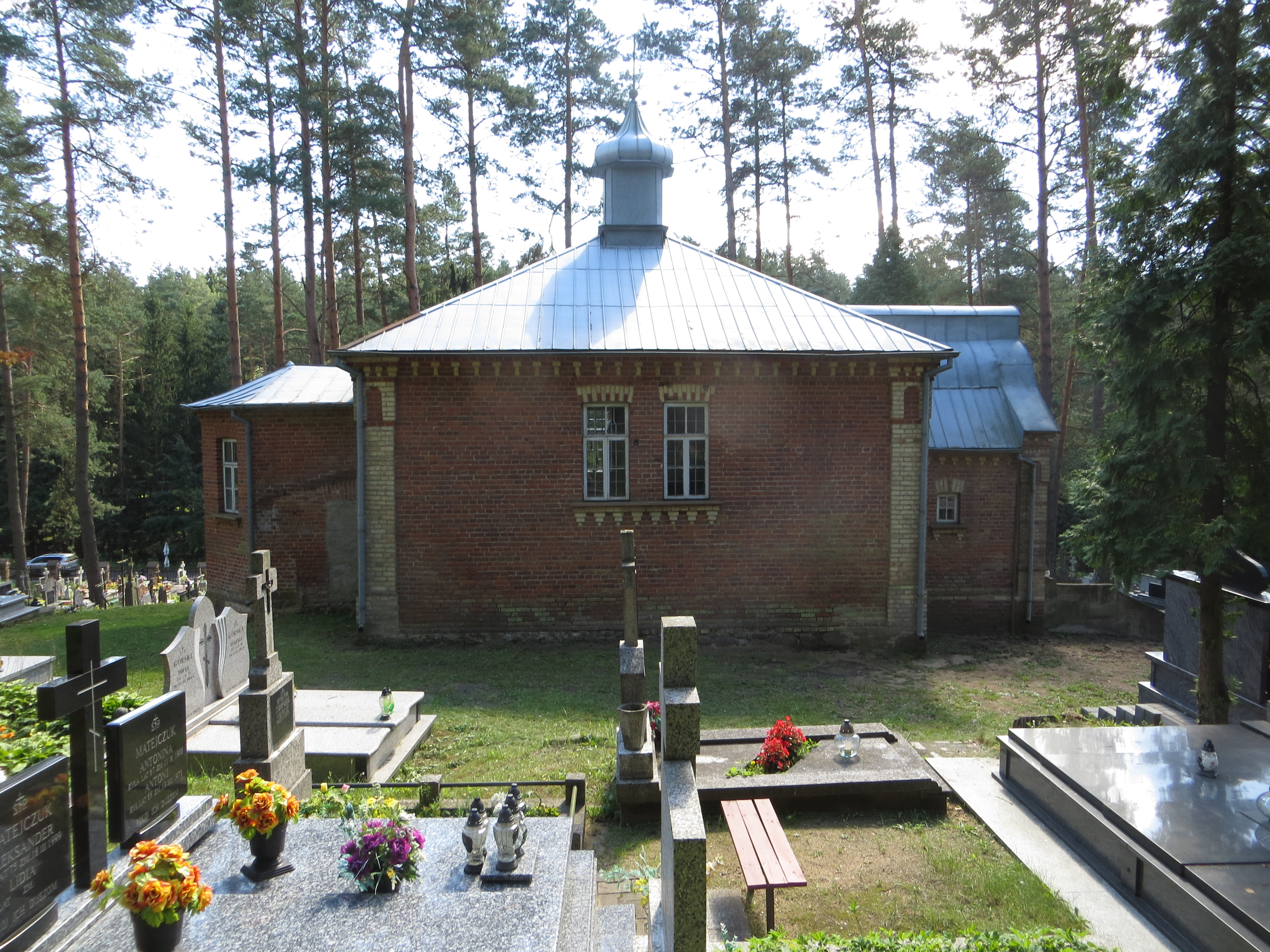 Supraśl, ul. Podsupraśl - zespół cmentarza prawosławnego z cerkwią p.w. św. Jerzego Męczennika: kaplica p.w. św. Jerzego Męczennika (zabytek nr 818 z 15.09.1997)